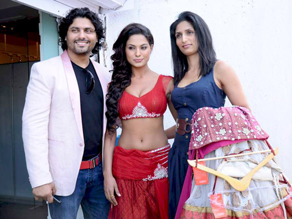 Riyaz Gangji, Veena Malik, Reshma Gangji at photo shoot at Riyaz Gangji's store